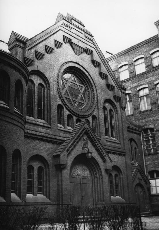 20.1.1967 Berlin (West), Charlottenburg, Synagoge in der Pestalozzstr.